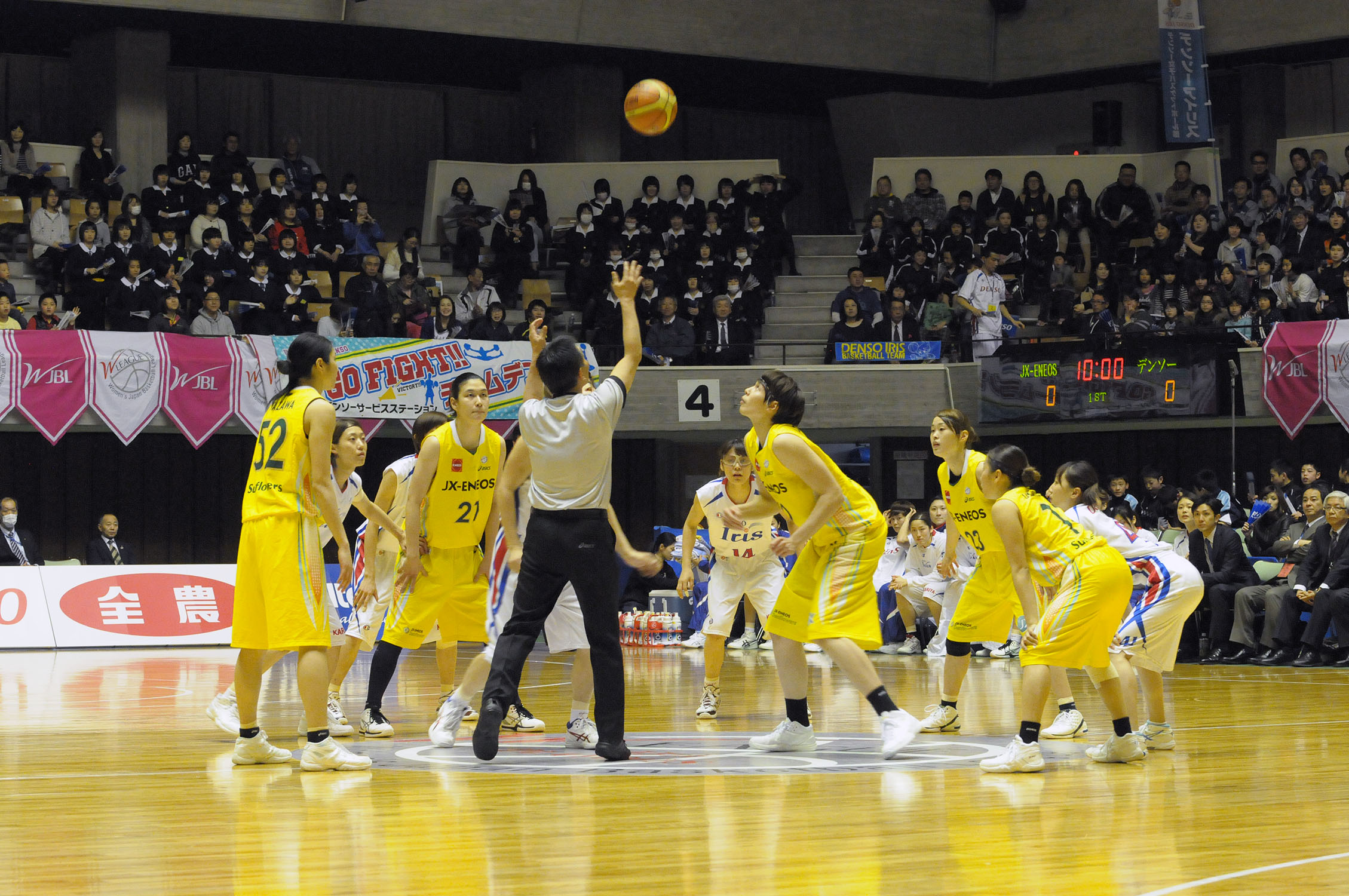 WJBL 13-14プレーオフファイナル、デンソーアイリス対JX-ENEOSサンフラワーズ。秋田県立体育館。